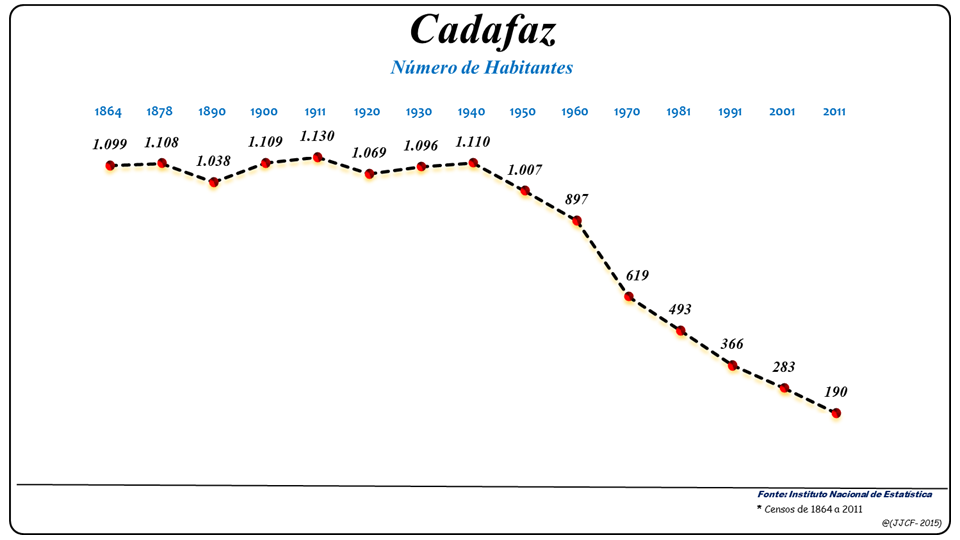 População